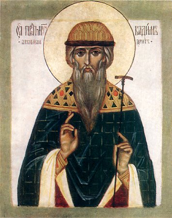 Icono de San Vadim